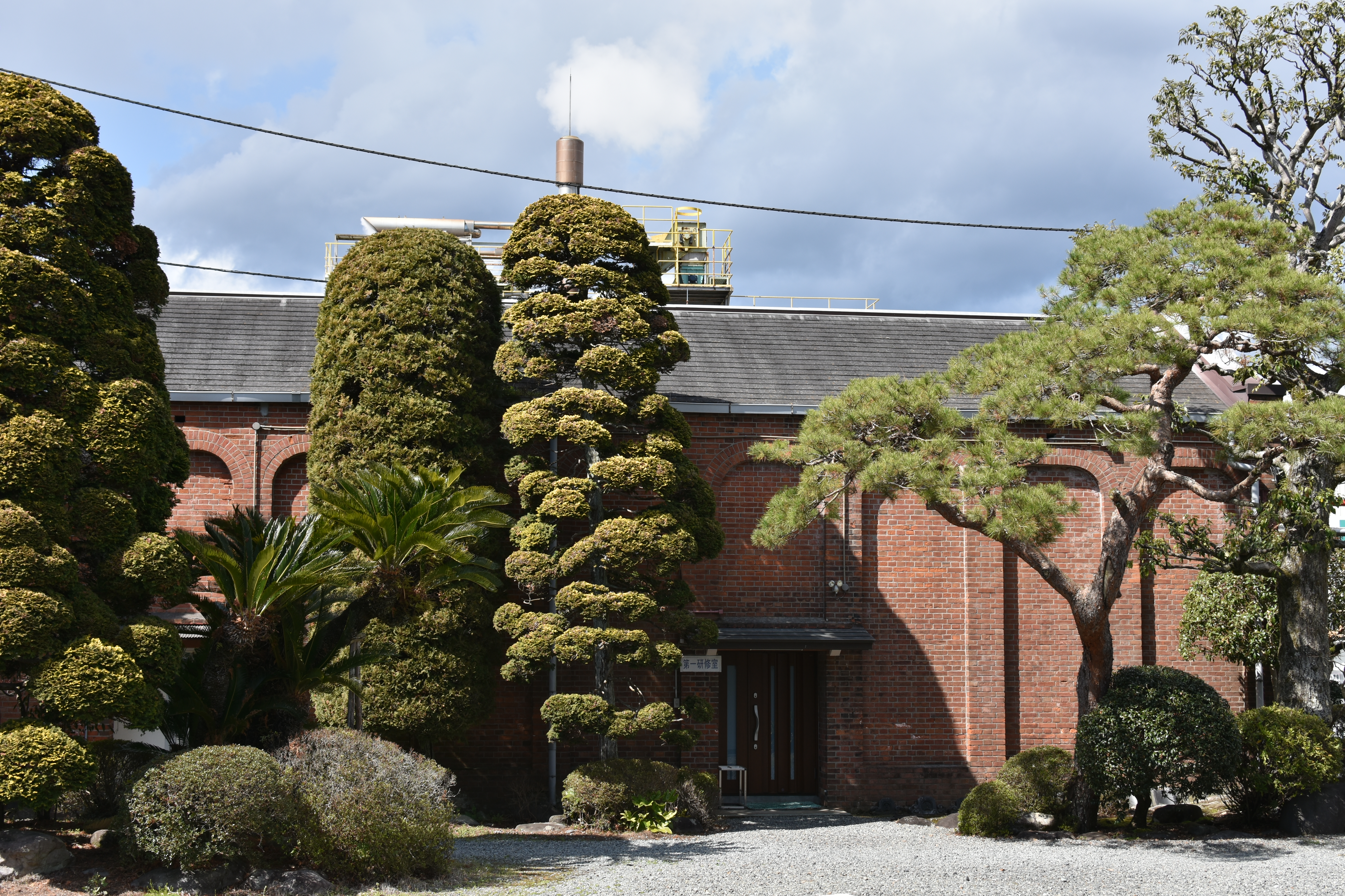 王子エフテックス芝川工場（旧四日市製紙芝川工場）の建屋。明治31年（1898）竣工。現在は研修室として利用。